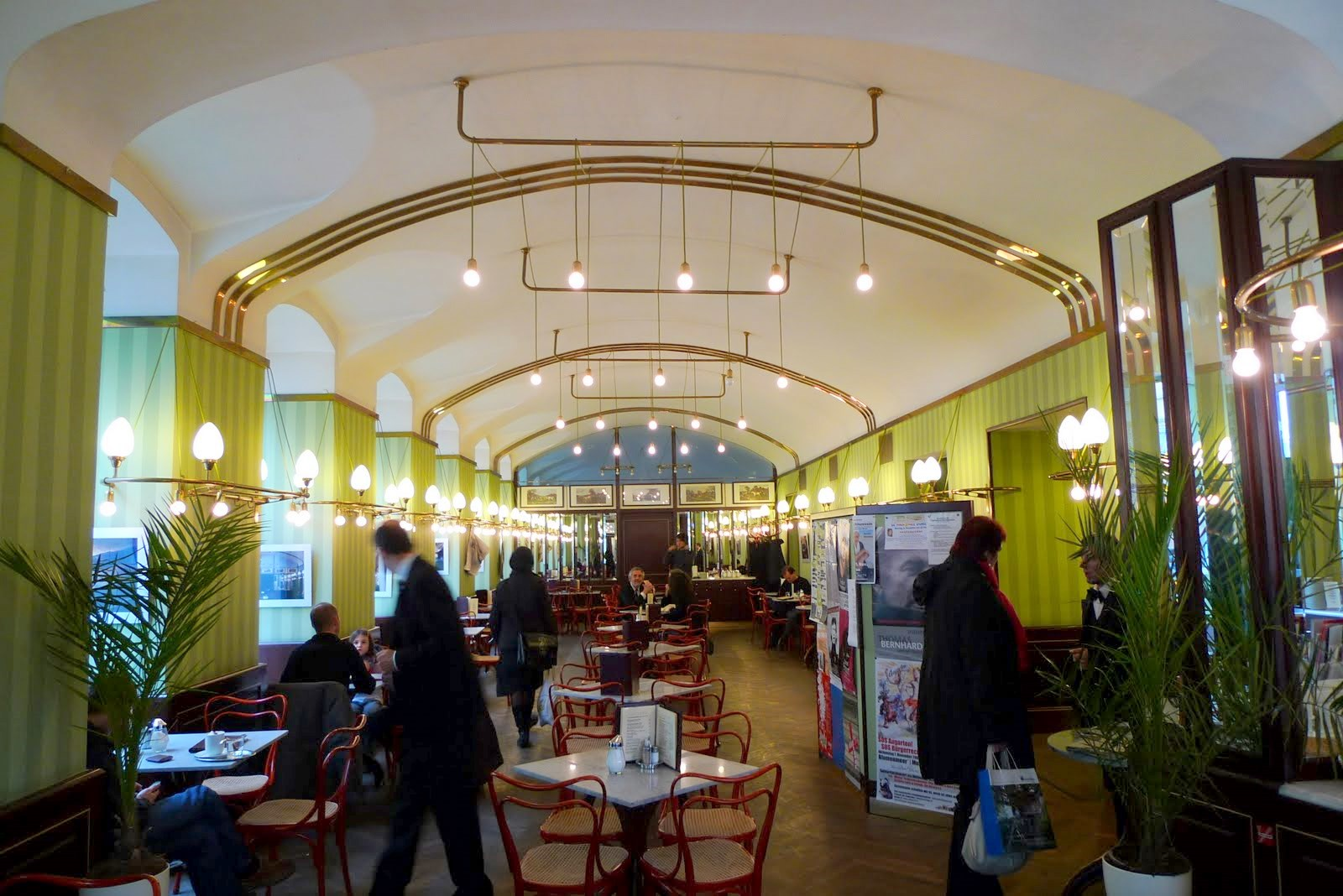 Cafe Museum vor 2010 nach Originalplänen von Loos saniert.